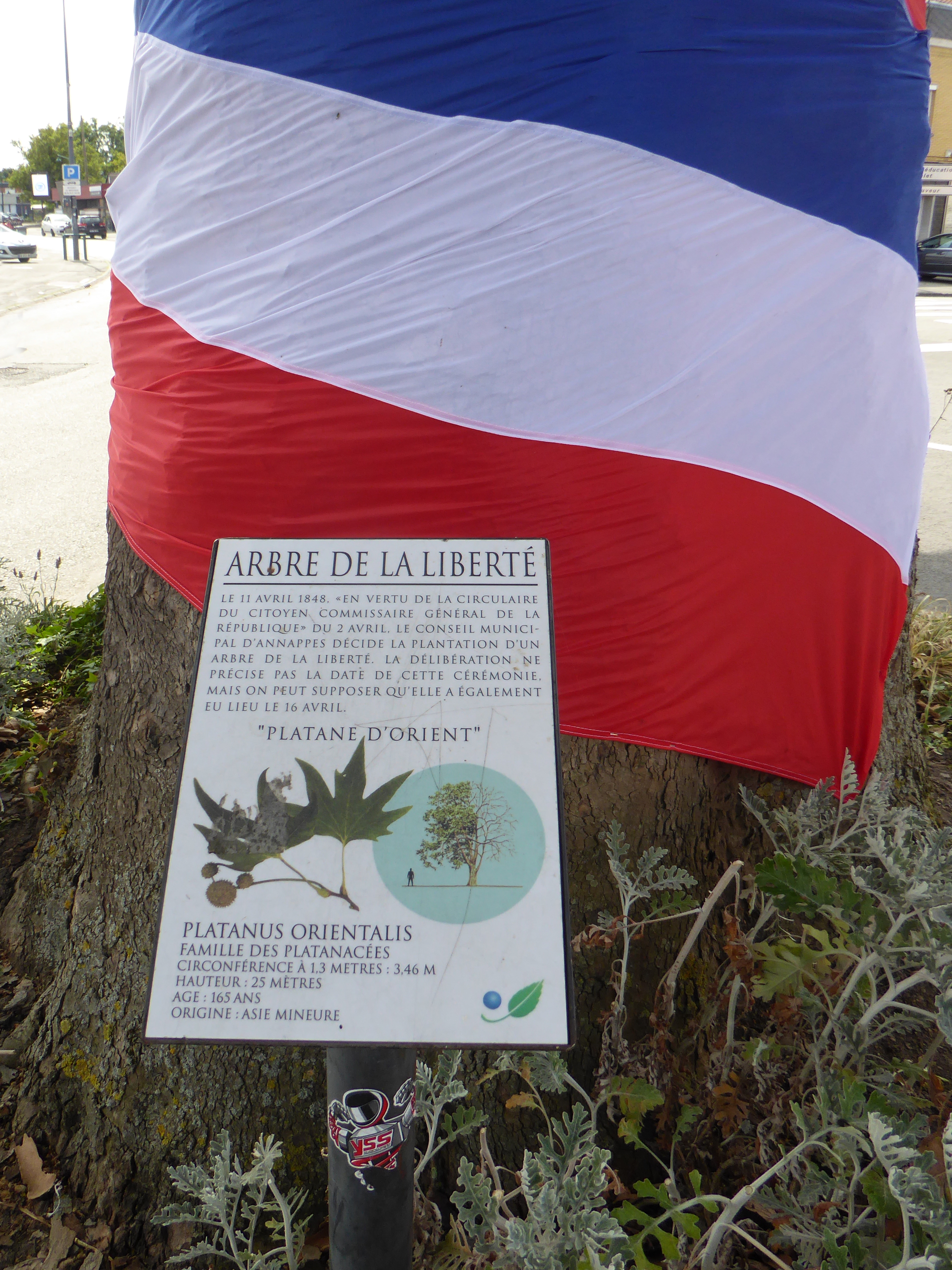 L'« Arbre de la Liberté », un platane d'Orient a été planté en 1848 sur la place du village pour fêter l'avènement de la Seconde République Villeneuve-d'Ascq, France